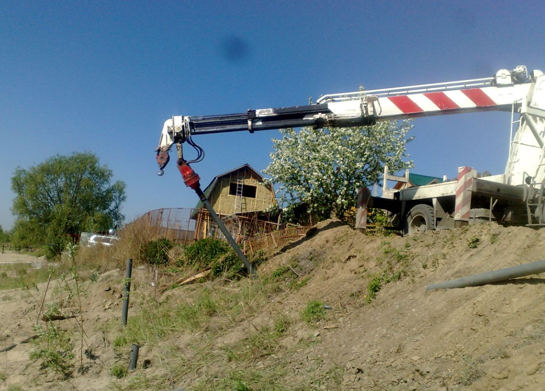 Укрепление береговой линии винтовыми сваями в Новосибирском районе. пос. Рыбачий